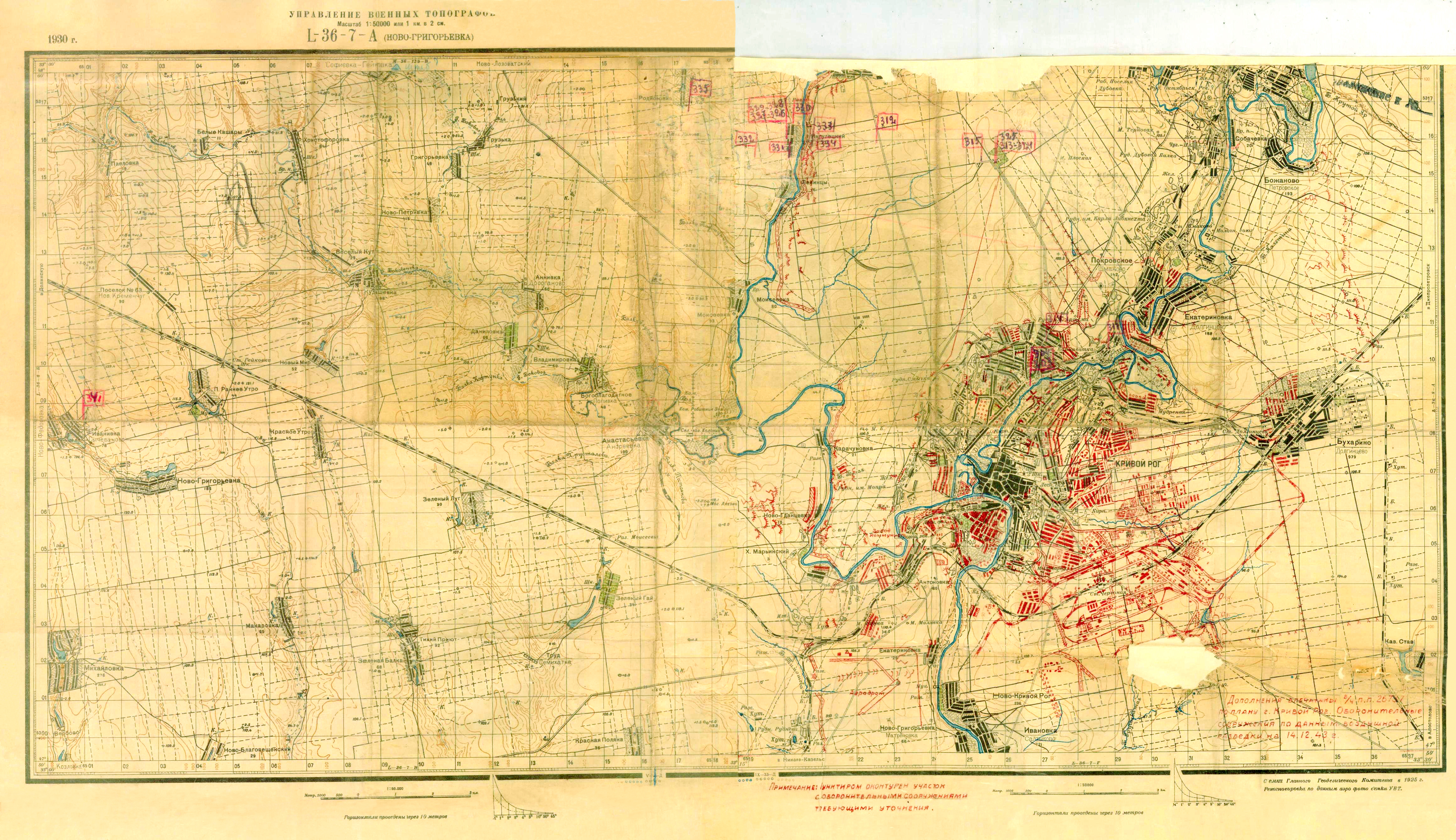 L-36-007-А